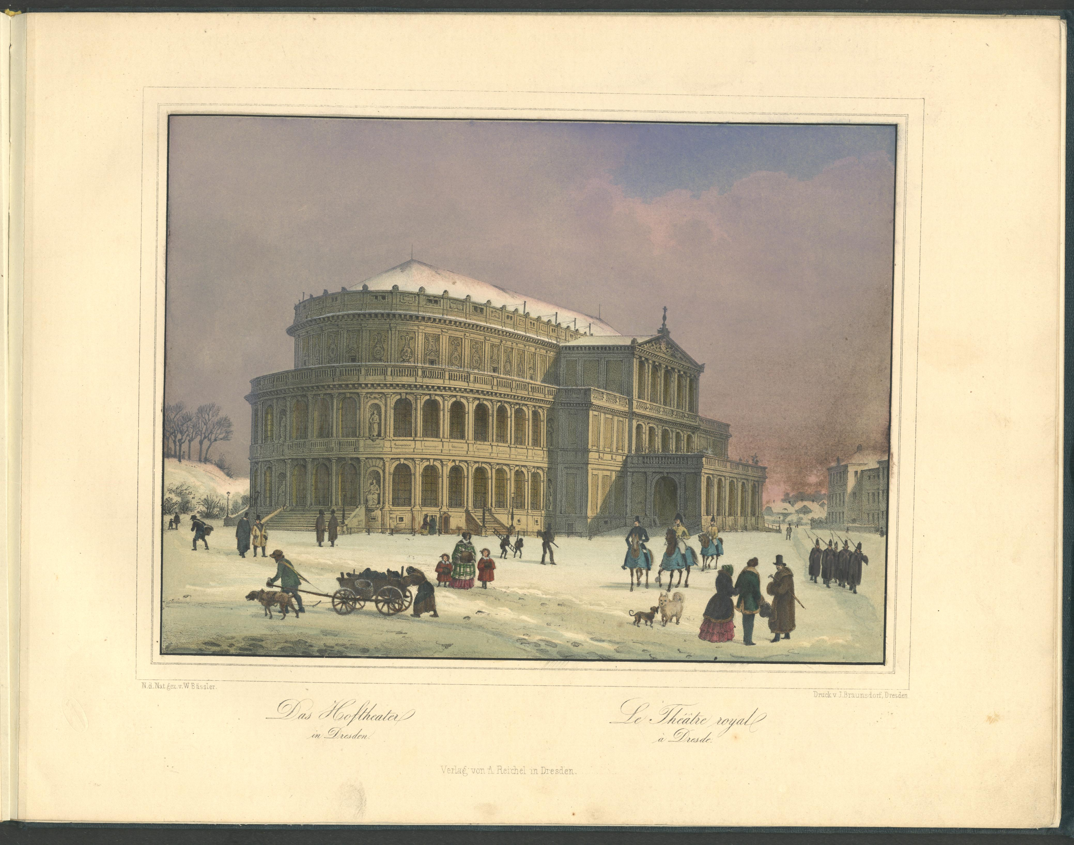 siehe Bildbeschreibung aus: Album von Dresden. Reichel [u.a.] Dresden, ca. 1852